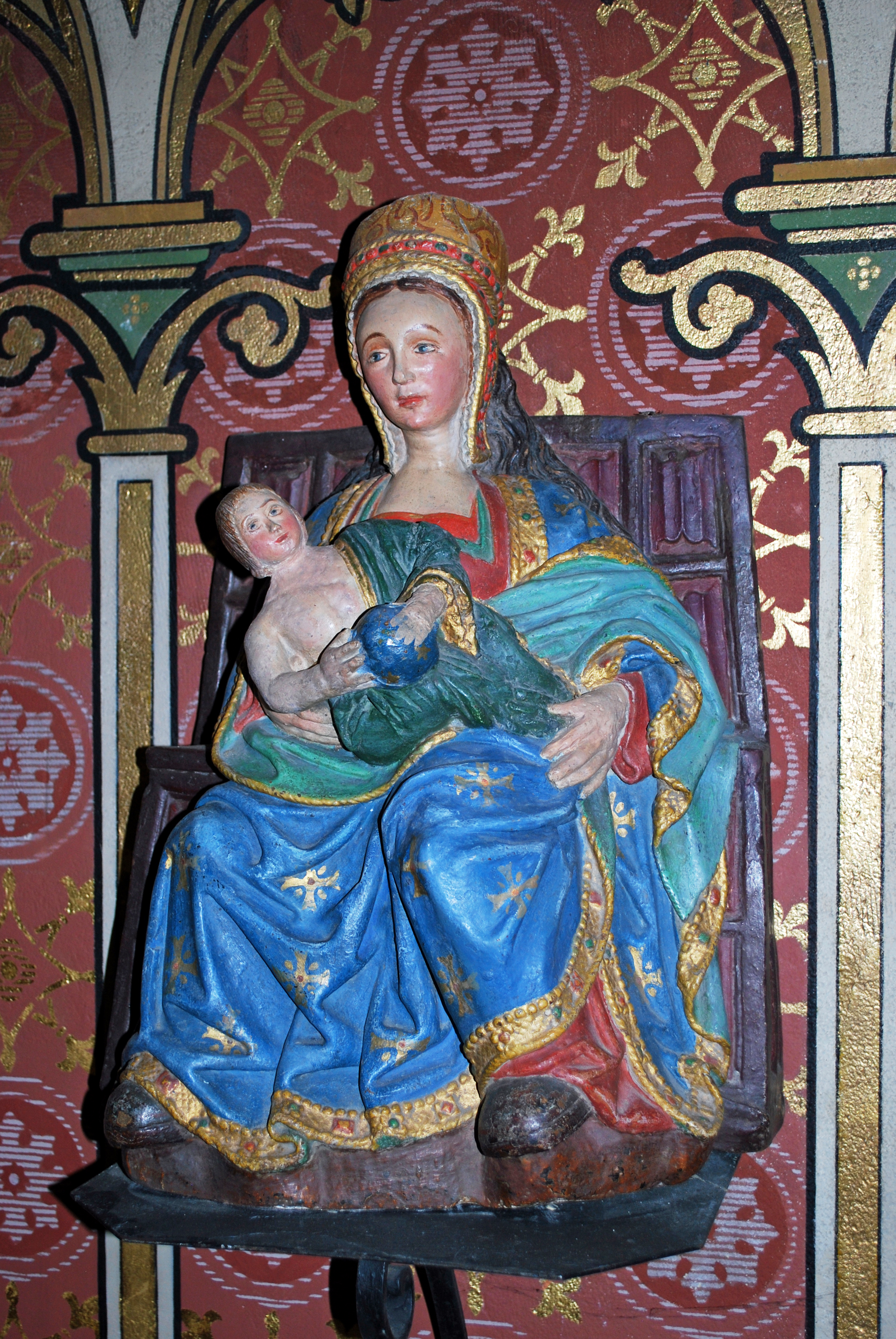 Libourne Chapelle de Condat